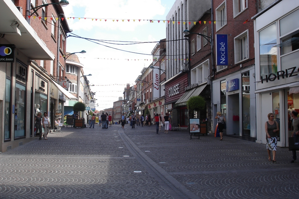 Photo prise par mes soins, il s'agit de la rue de Paris (rue pietonne) de Lens 62300 France